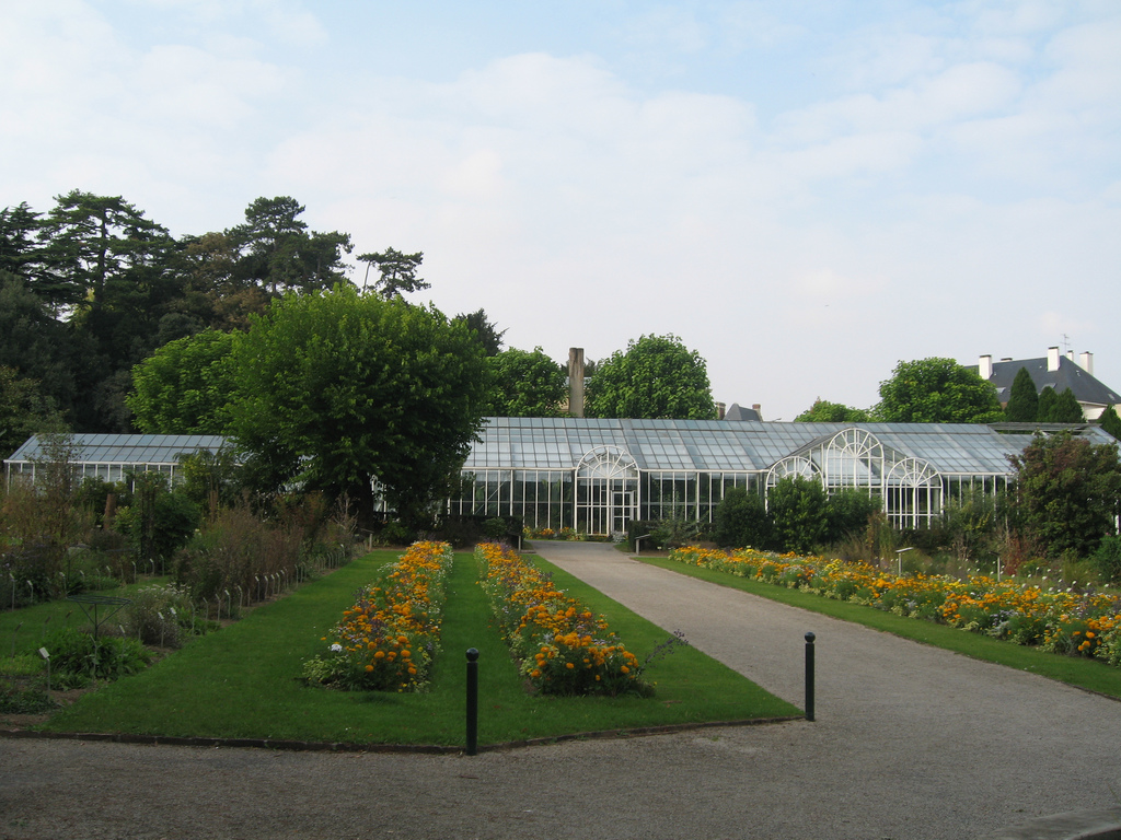 Serres du jardin des plantes de Caen